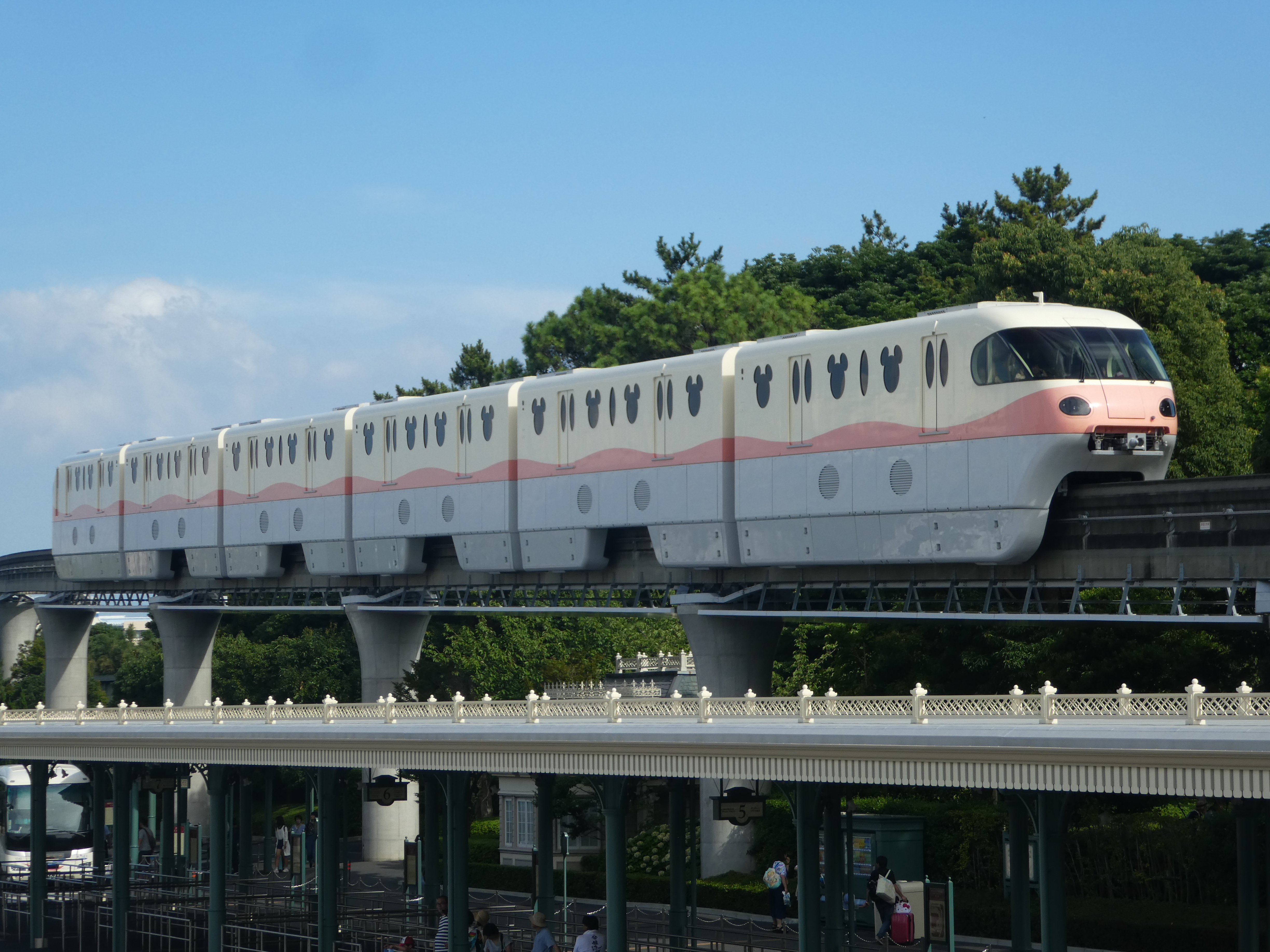 ディズニーリゾートライン第5編成(ピーチ)の写真です。